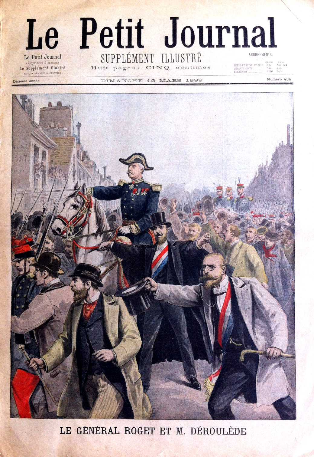 Paul Déroulède et Marcel Habert tentent de commettre un coup d'État en détournant les troupes du général Roget vers le palais de l'Élysée. Illustration en une du supplément illustré du Petit Journal.